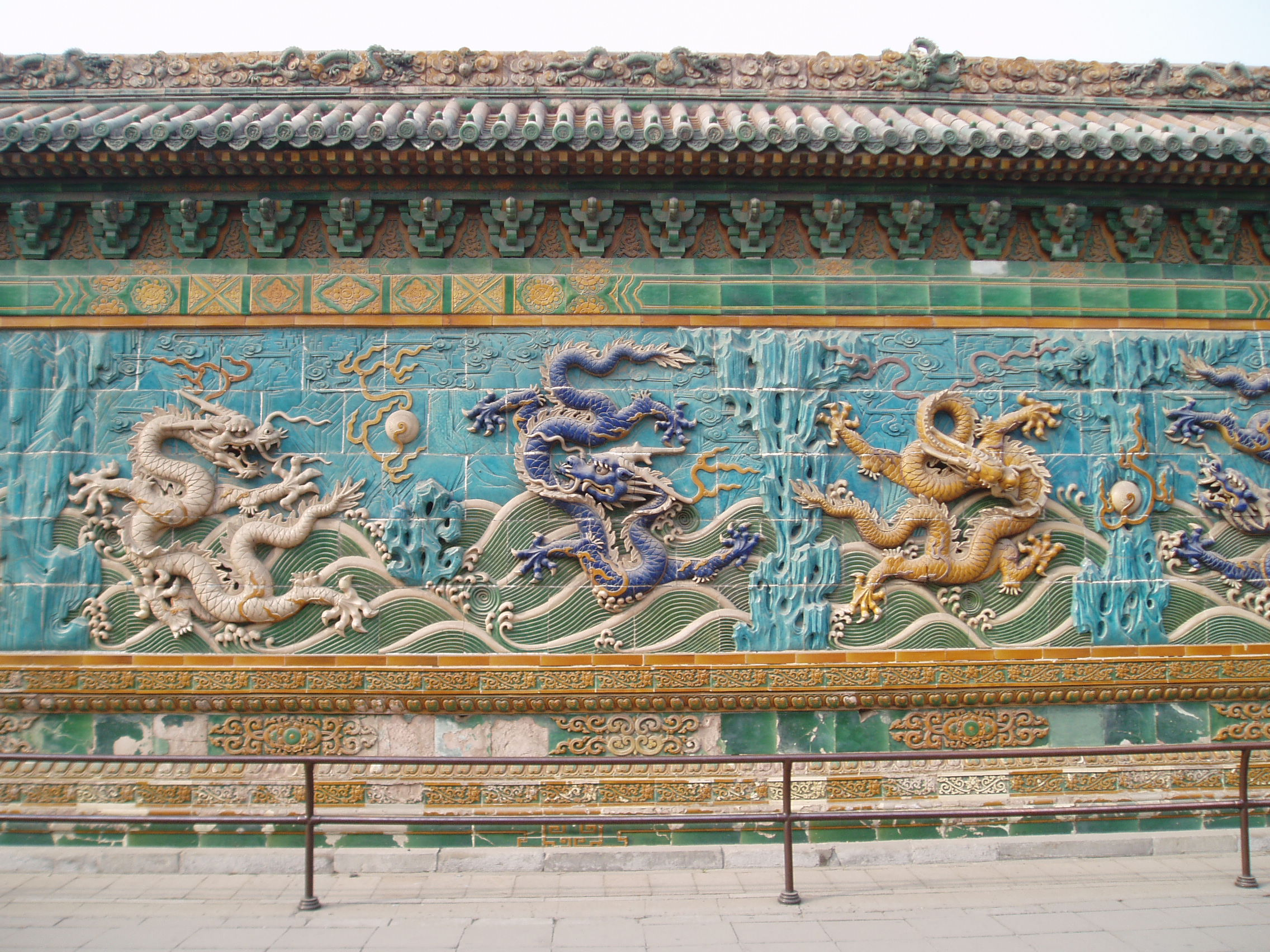 The Beihai Park in Beijing